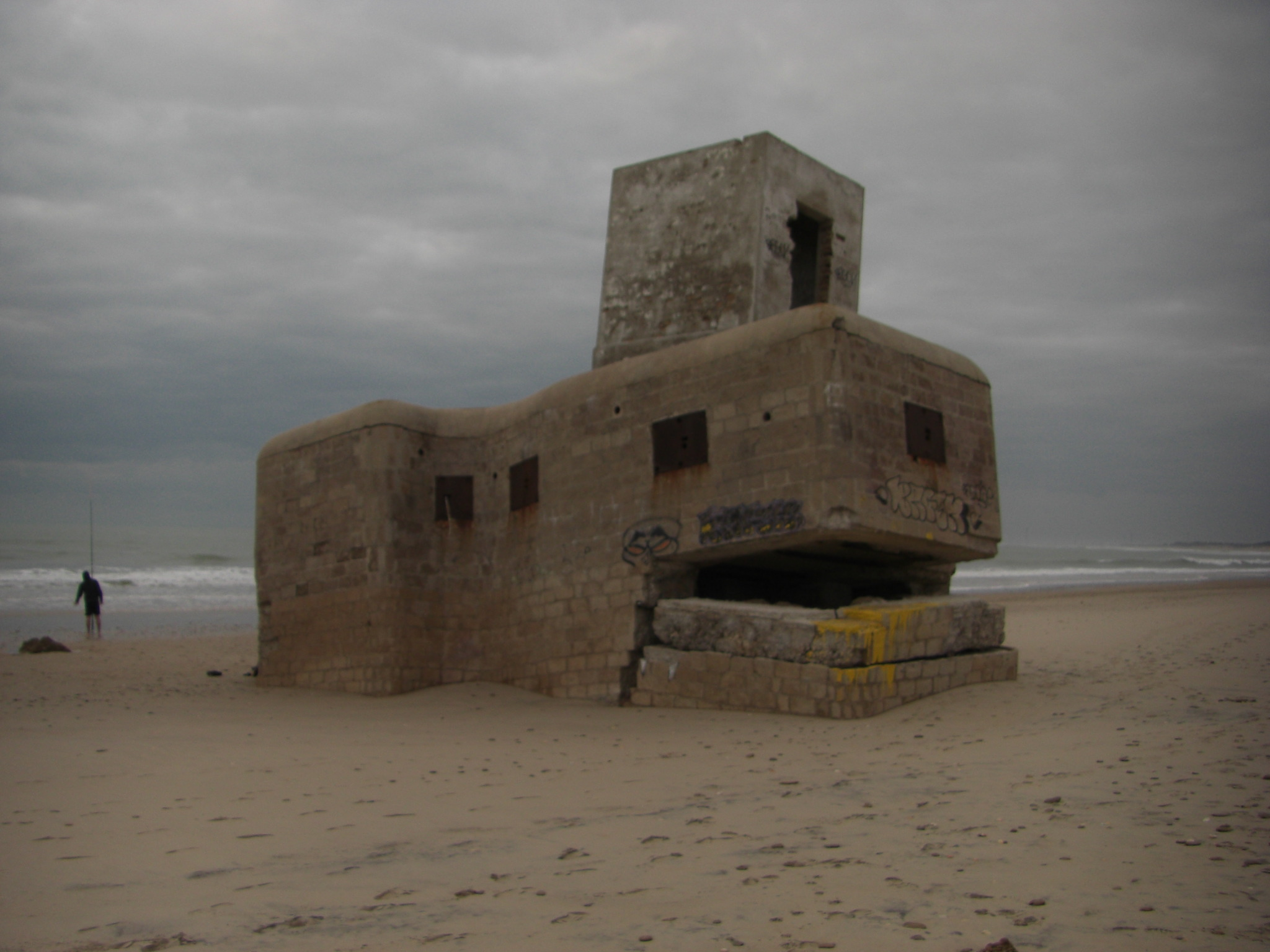 Fotografia del Bunker numero 2 en la playa de Camposoto tomada hacia el norte.